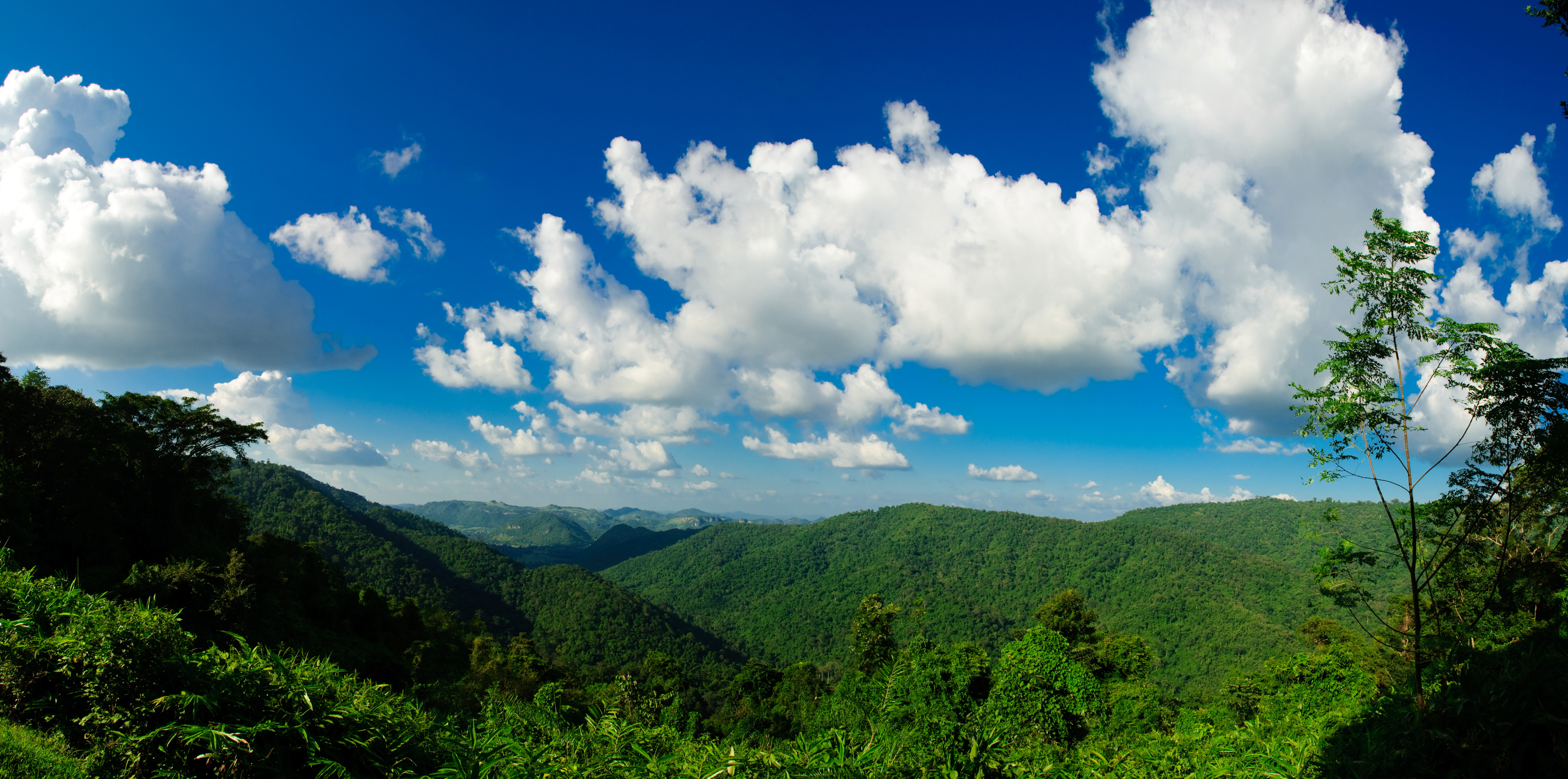 ทัศนียภาพบริเวณจุดชมวิว กม. 30